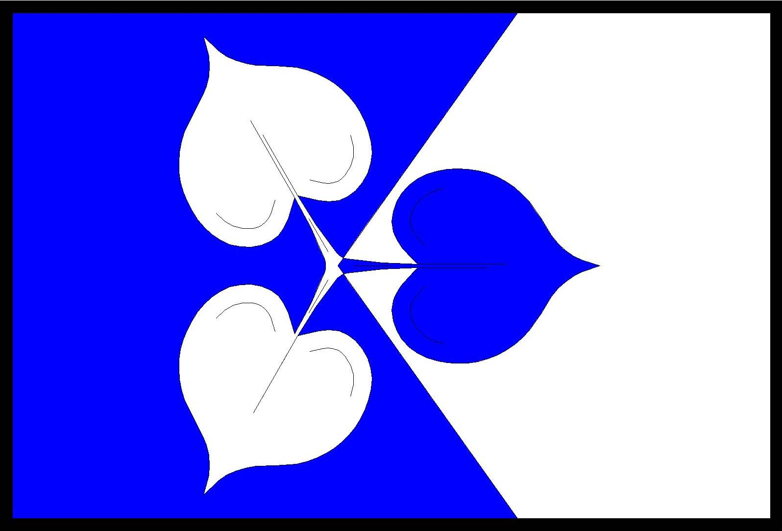 Vlajka obce Zvole (okres Praha-západ)